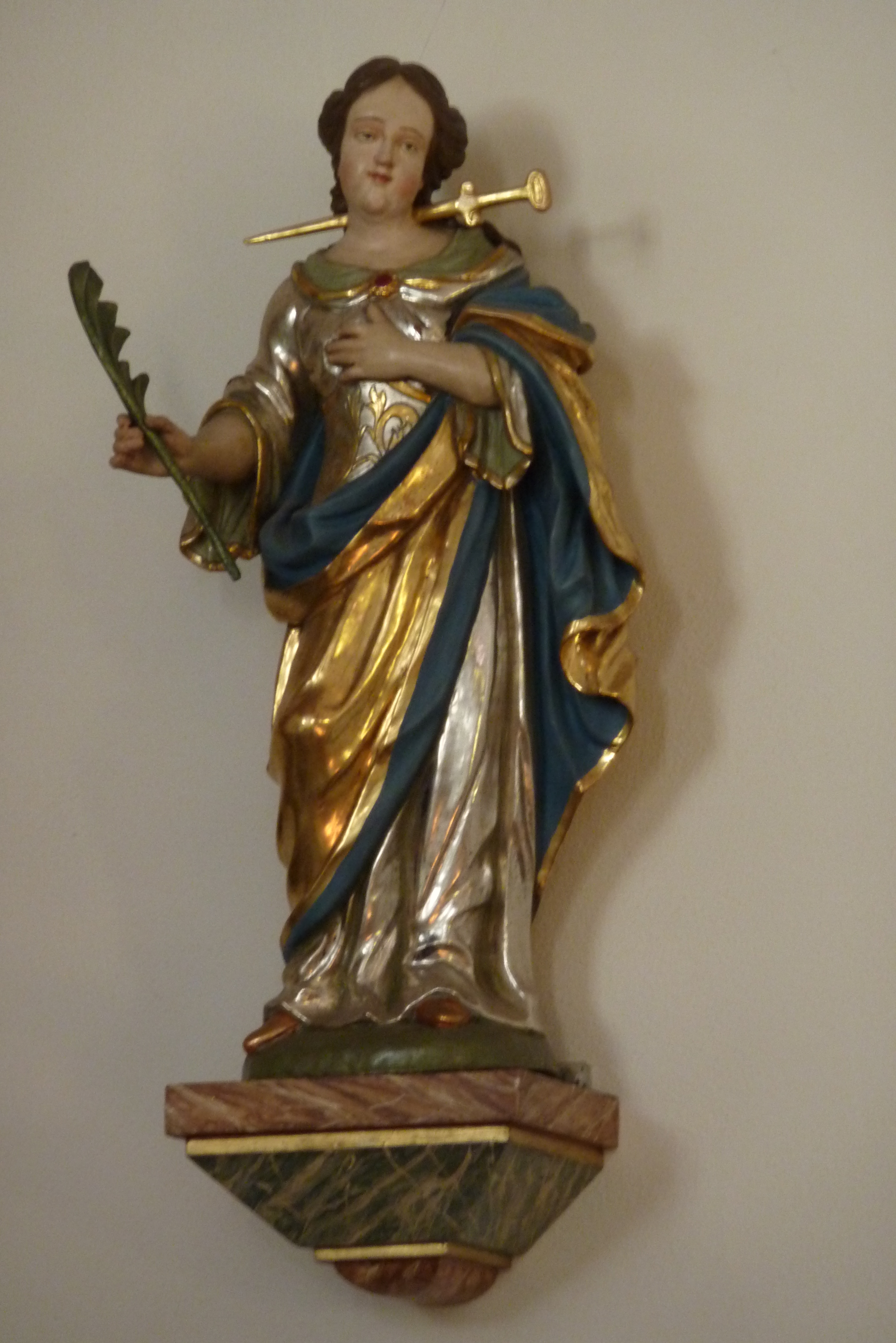 Pfarrkirche St. Luzia in Rech, Holzskulptur der hl. Lucia